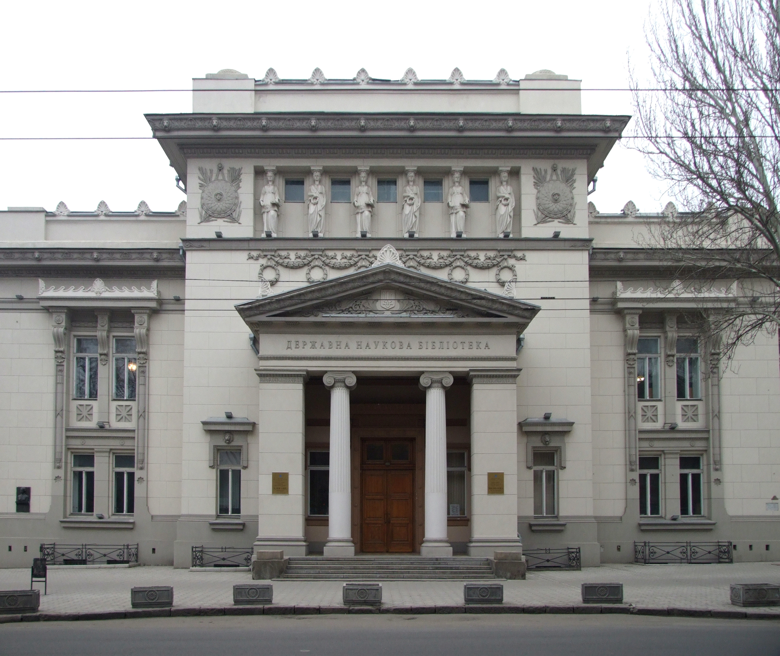 Одеська національна наукова бібліотека ім. М.Г. Горького (первісно Одеська міська імені імператора Миколи ІІ-го публічна бібліотека), архітектор Федір Павлович Нестурх, проект 1904 р.; Будівництво 1905-1906 рр.; Відкриття, 1907 р.